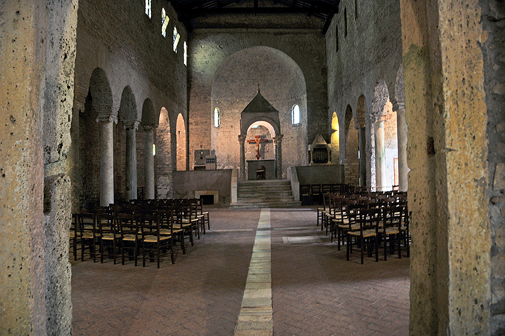 San Giovanni in Argentella - Palombara Sabina